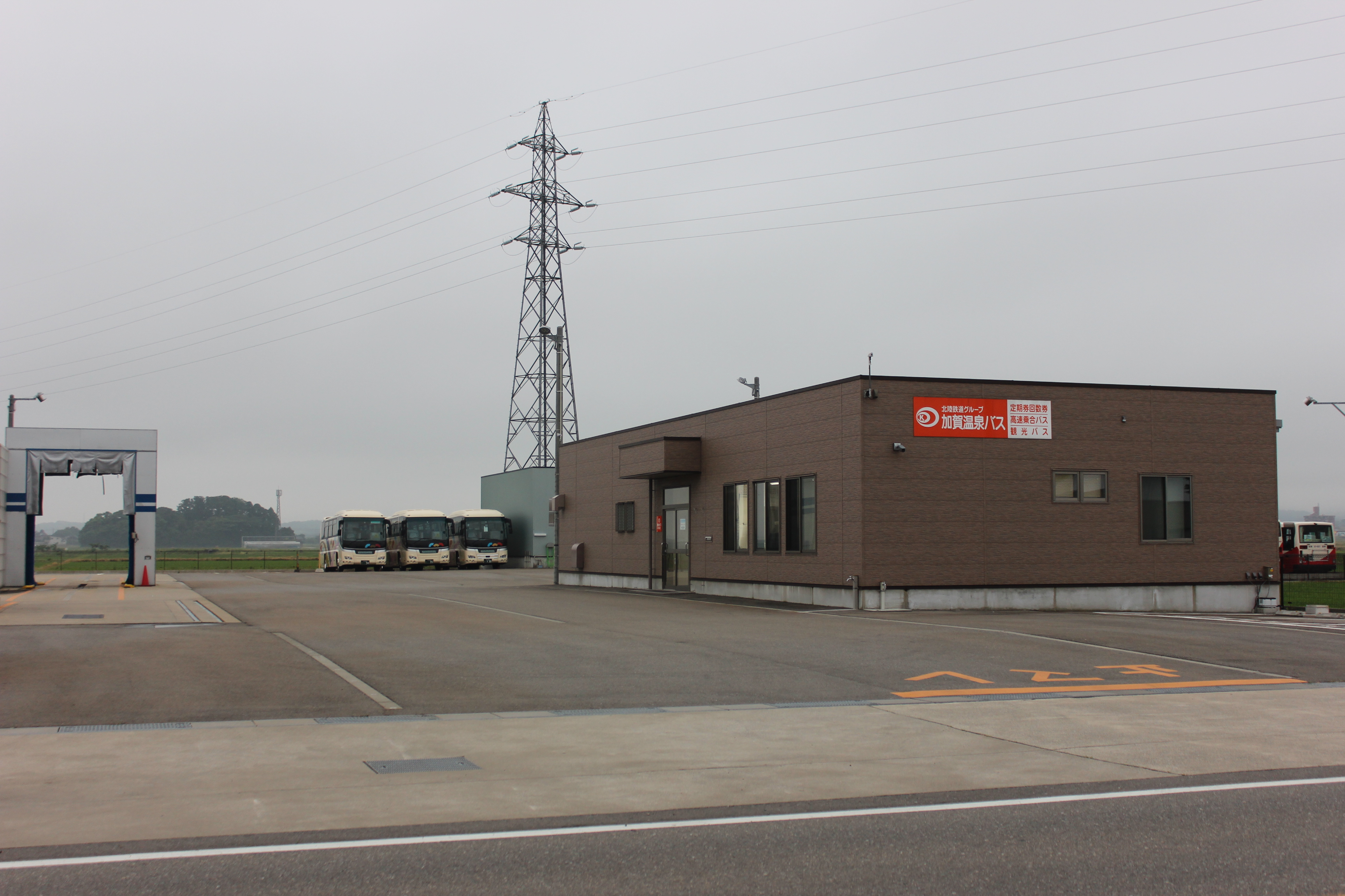 加賀温泉バス本社（石川県加賀市） Canon EOS Kiss X5